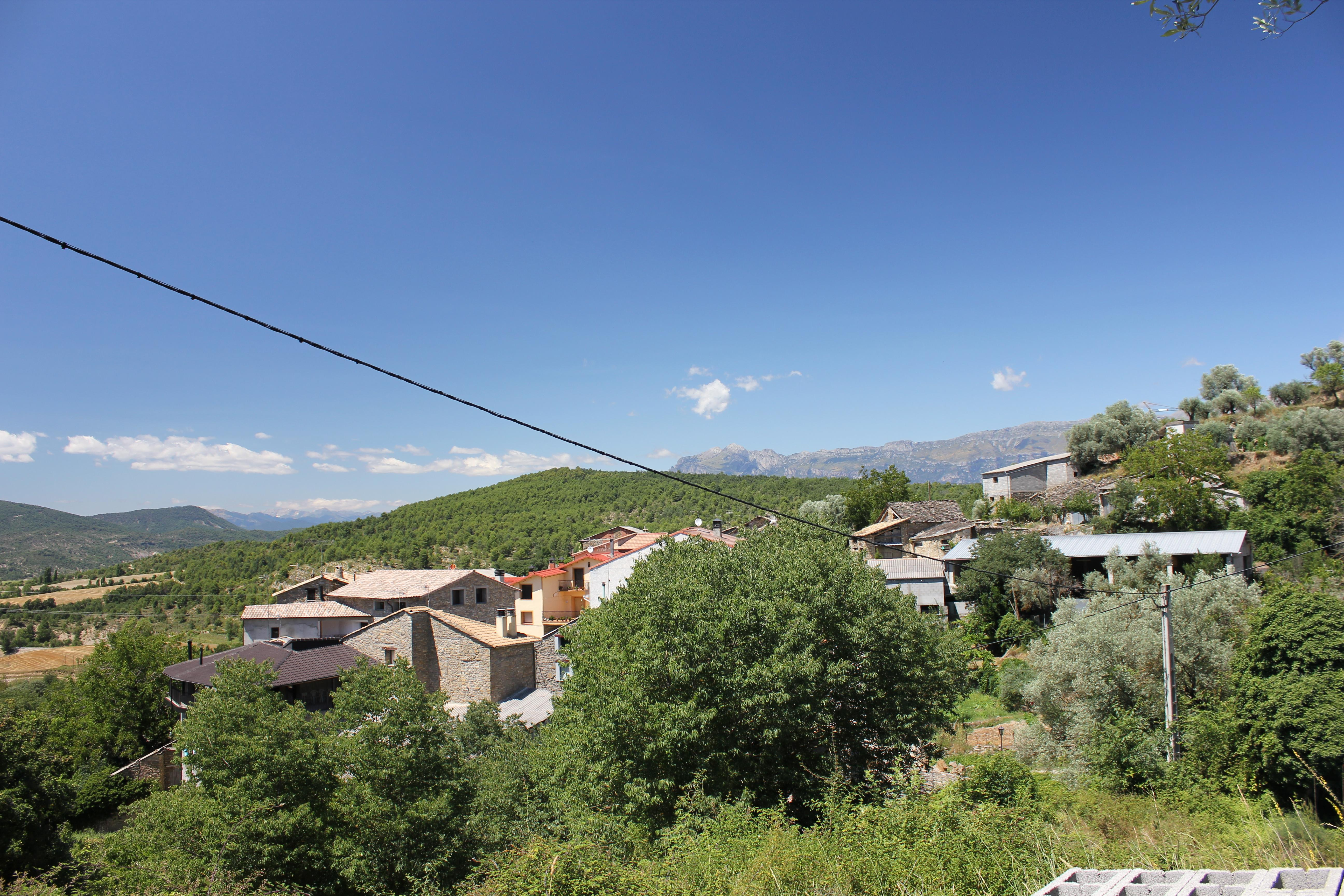 Aragonés: envista cheneral de Formigals